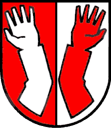 Wappen der politischen Gemeinde Sissach, Schweiz